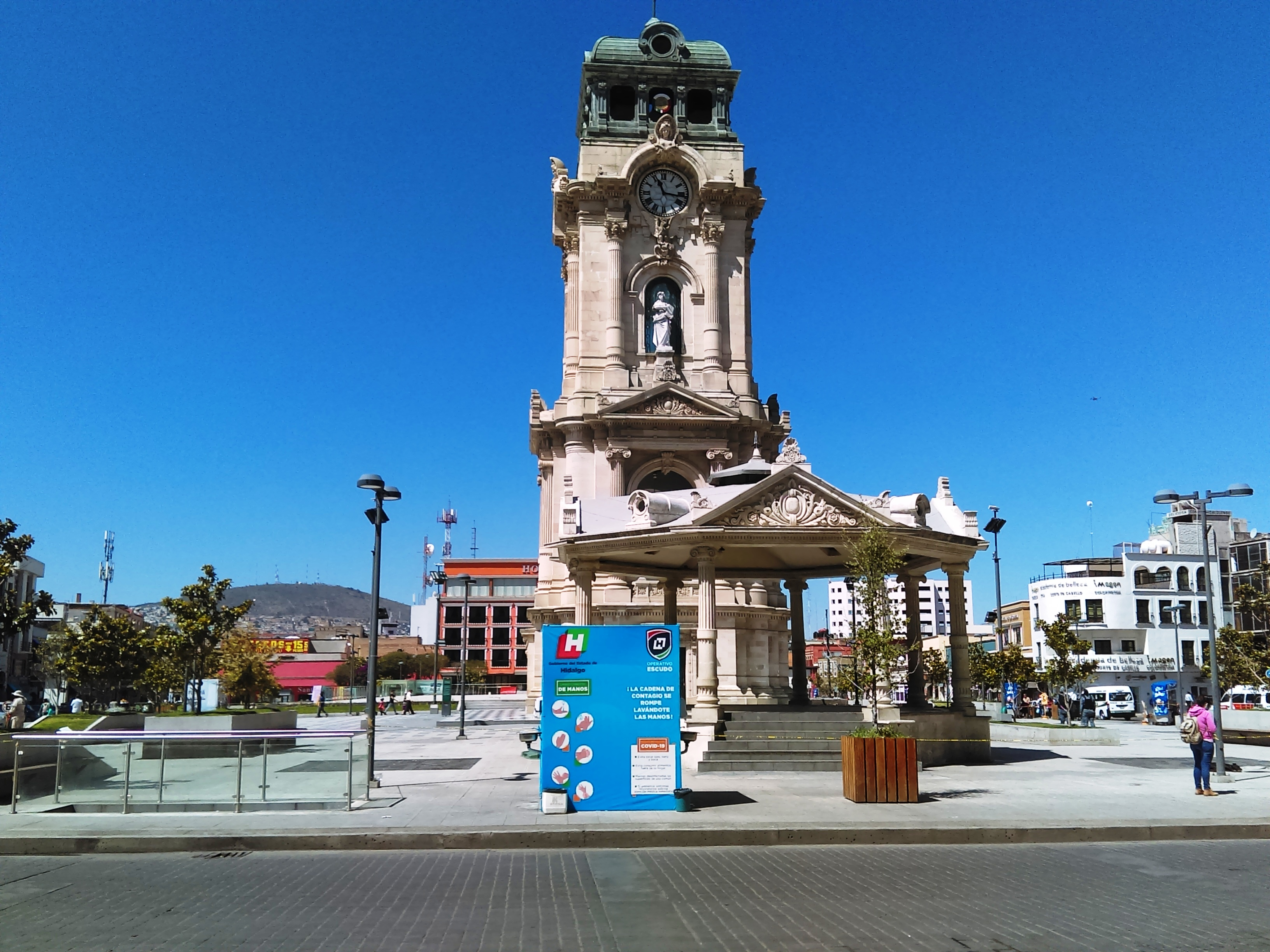 Espacios cerrados en Pachuca. 01